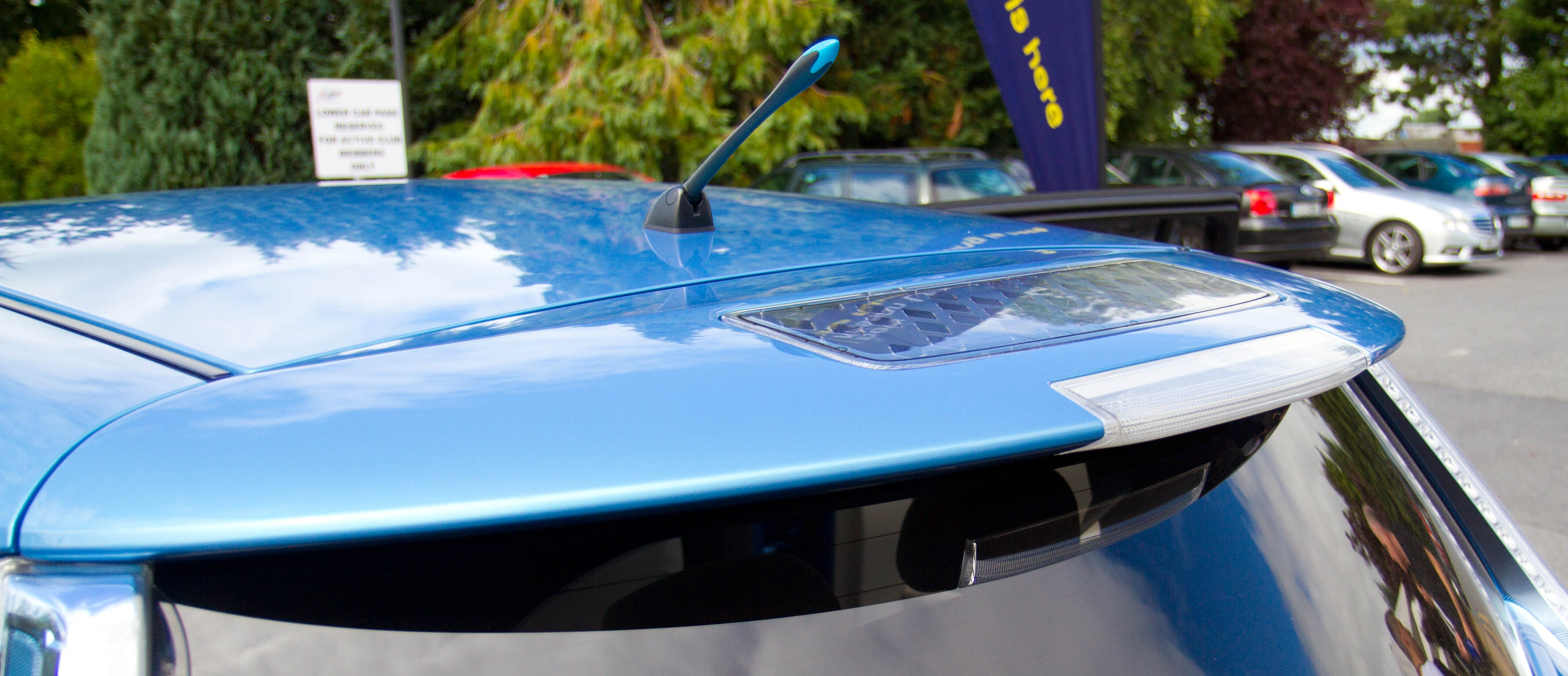 Nissan Leaf